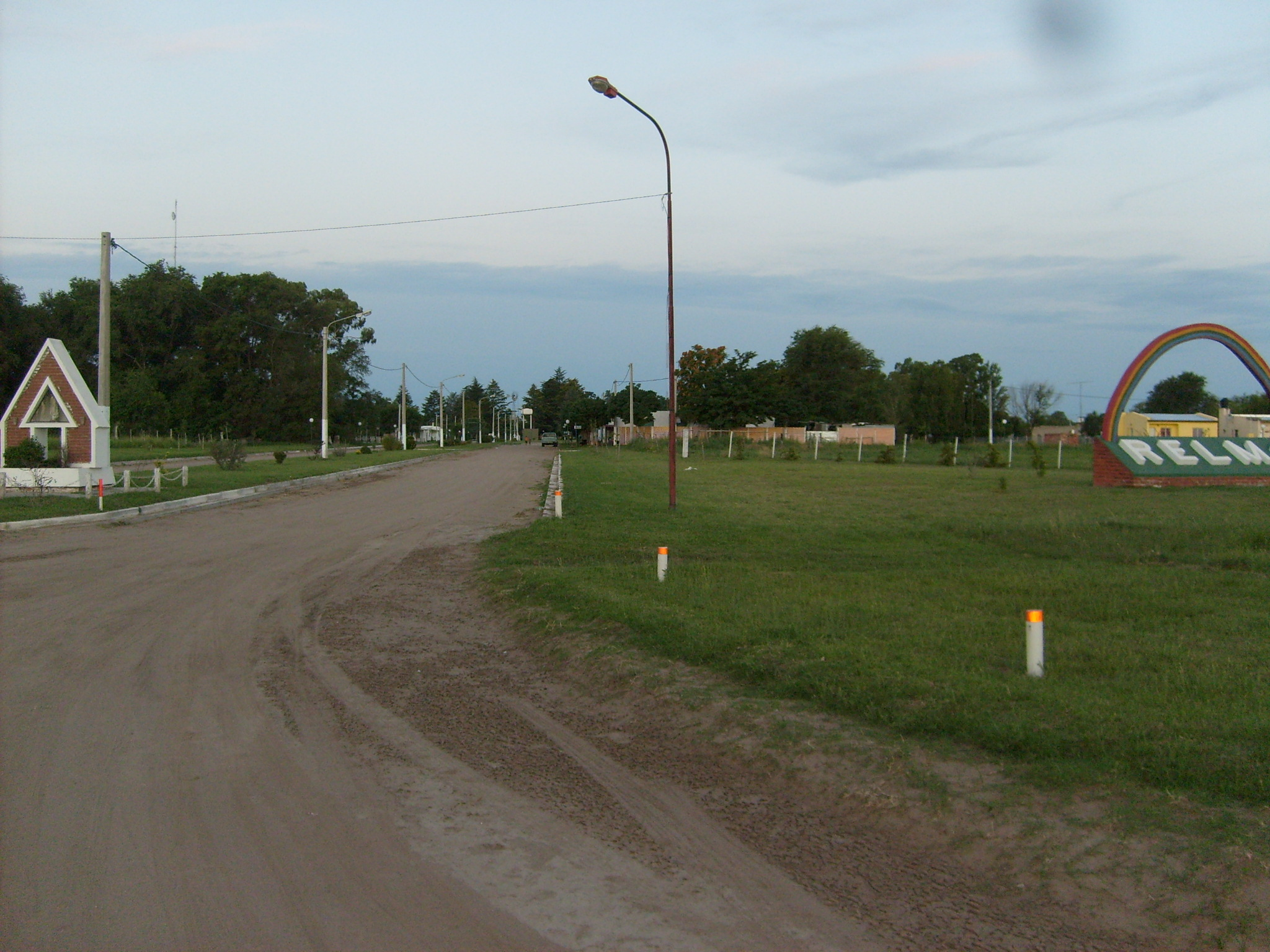 Acceso a la localidad de Relmo, Departamento Quemú Quemú, Provincia de La Pampa.